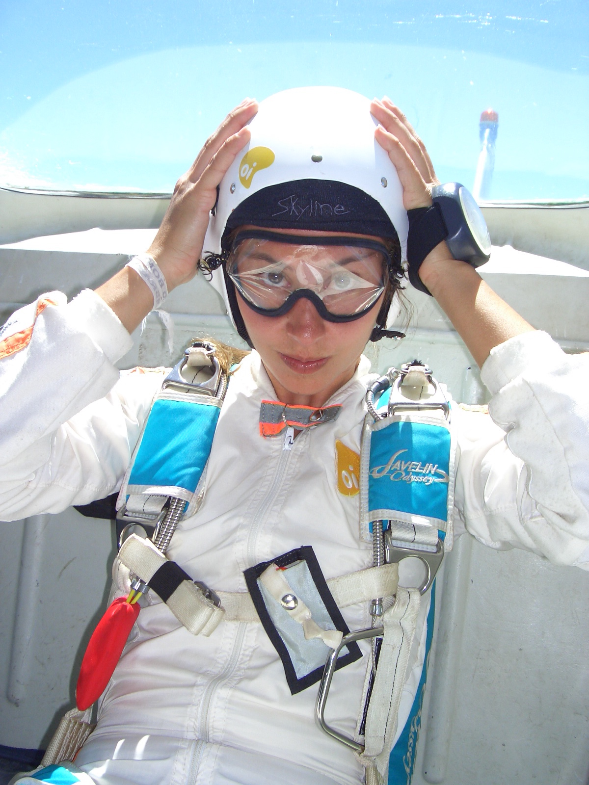 Dani se preparando para saltar de paraquedas